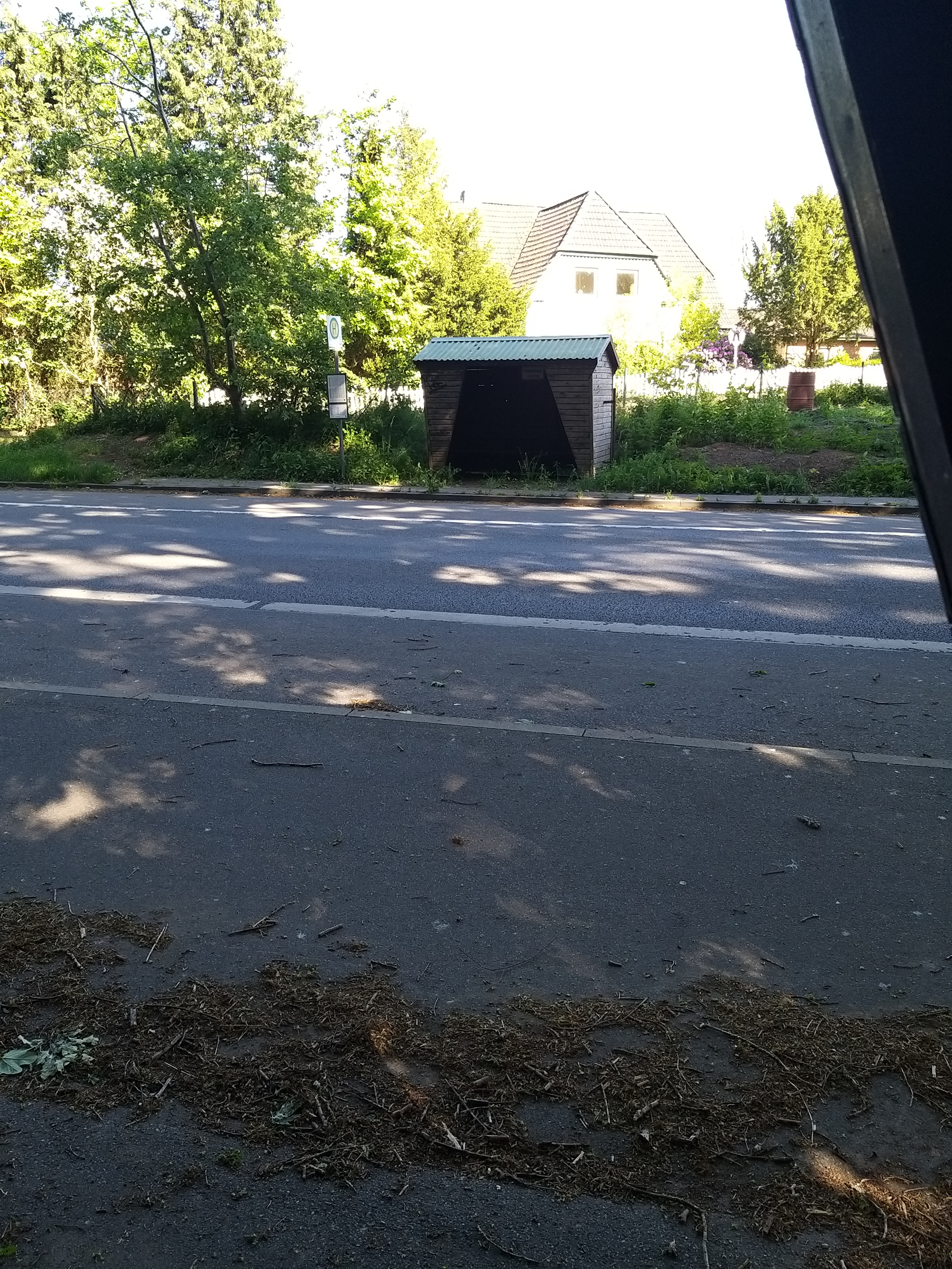 Neu-Revensdorf